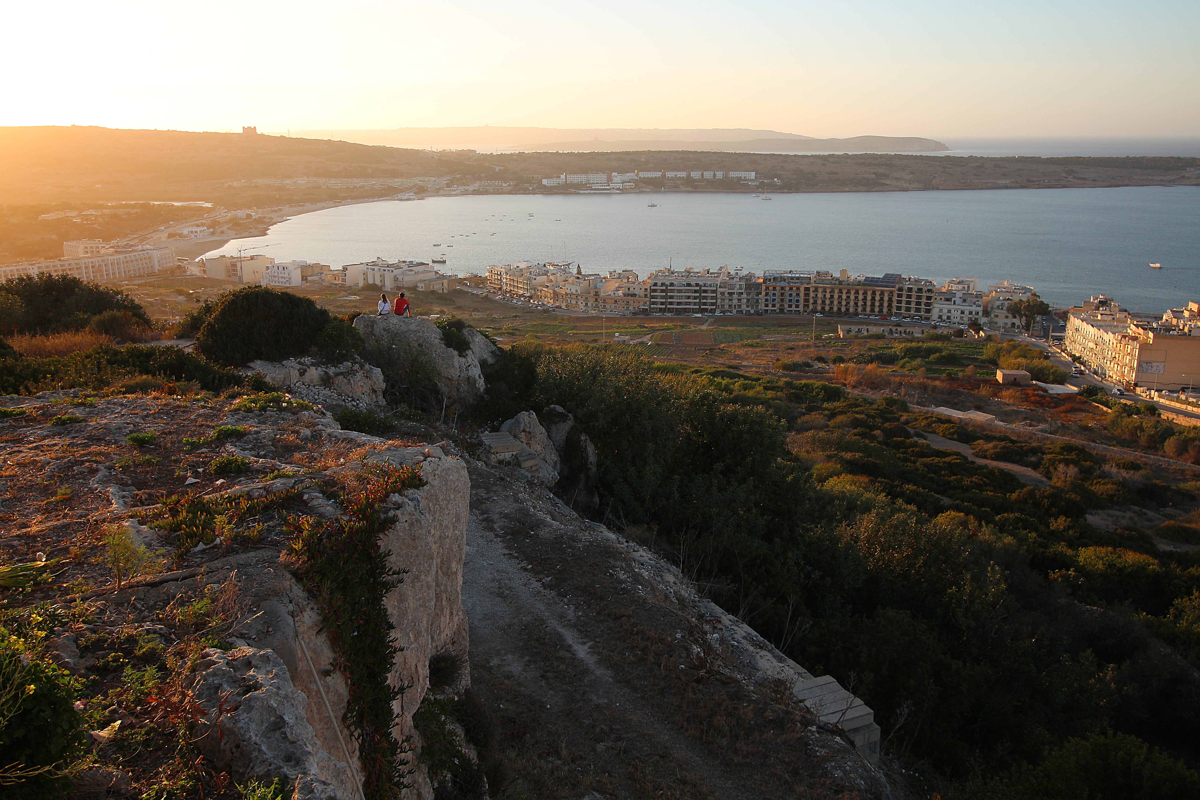 En vy över Mellieħa Bay.